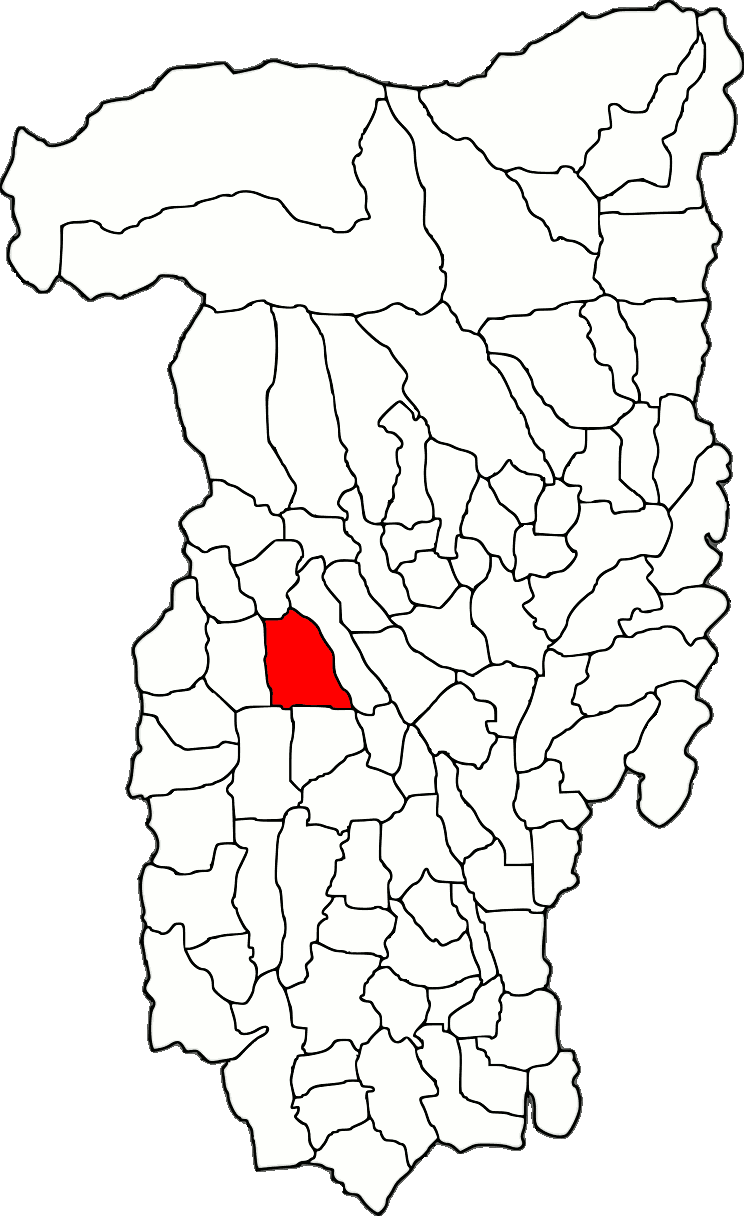 Lage der Gemeinde Copăceni im Kreis Vâlcea (RO).